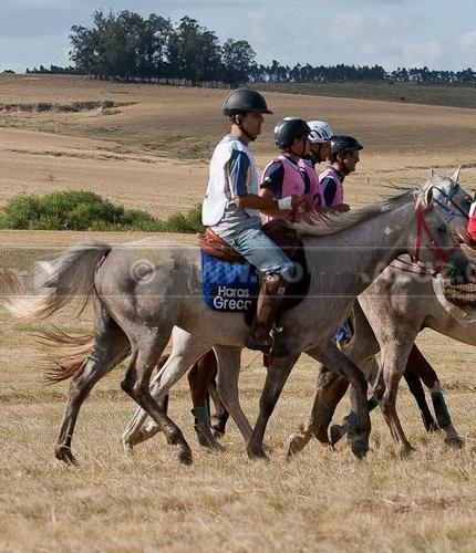 Enduro Equestre -Classificatória Internacional